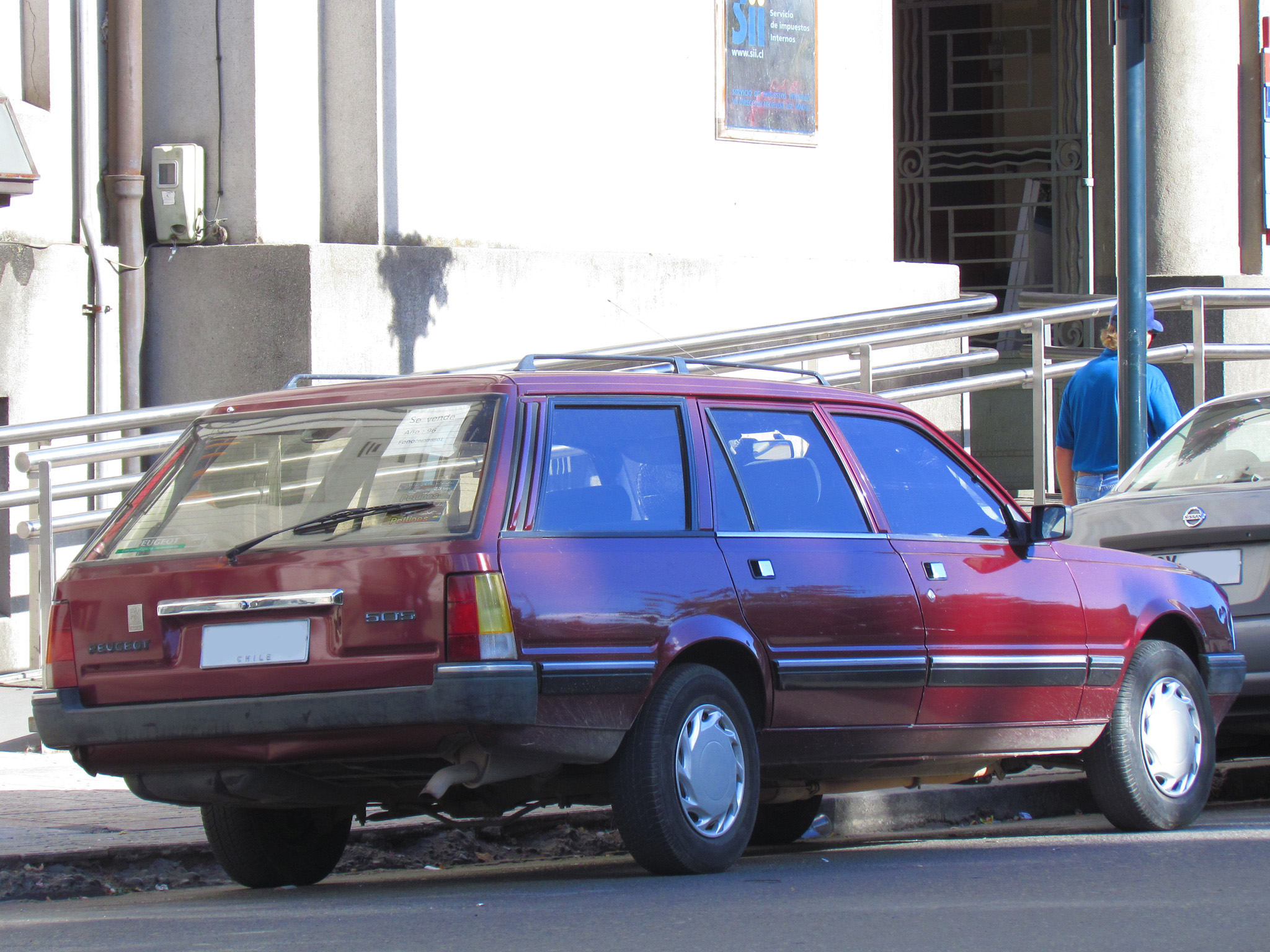 Peugeot 505 2.0 Familiar 1996